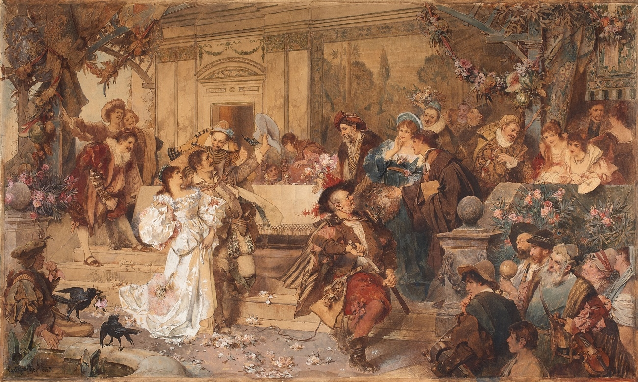 Petruccios Hochzeit. Signiert und datiert unten links: Carl Gehrts. 1885. Aquarell auf Papier, auf dünner Pappe montiert. 68 x 112 cm.